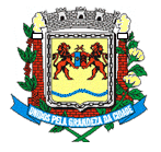 Brasão de Fernandópolis, SP